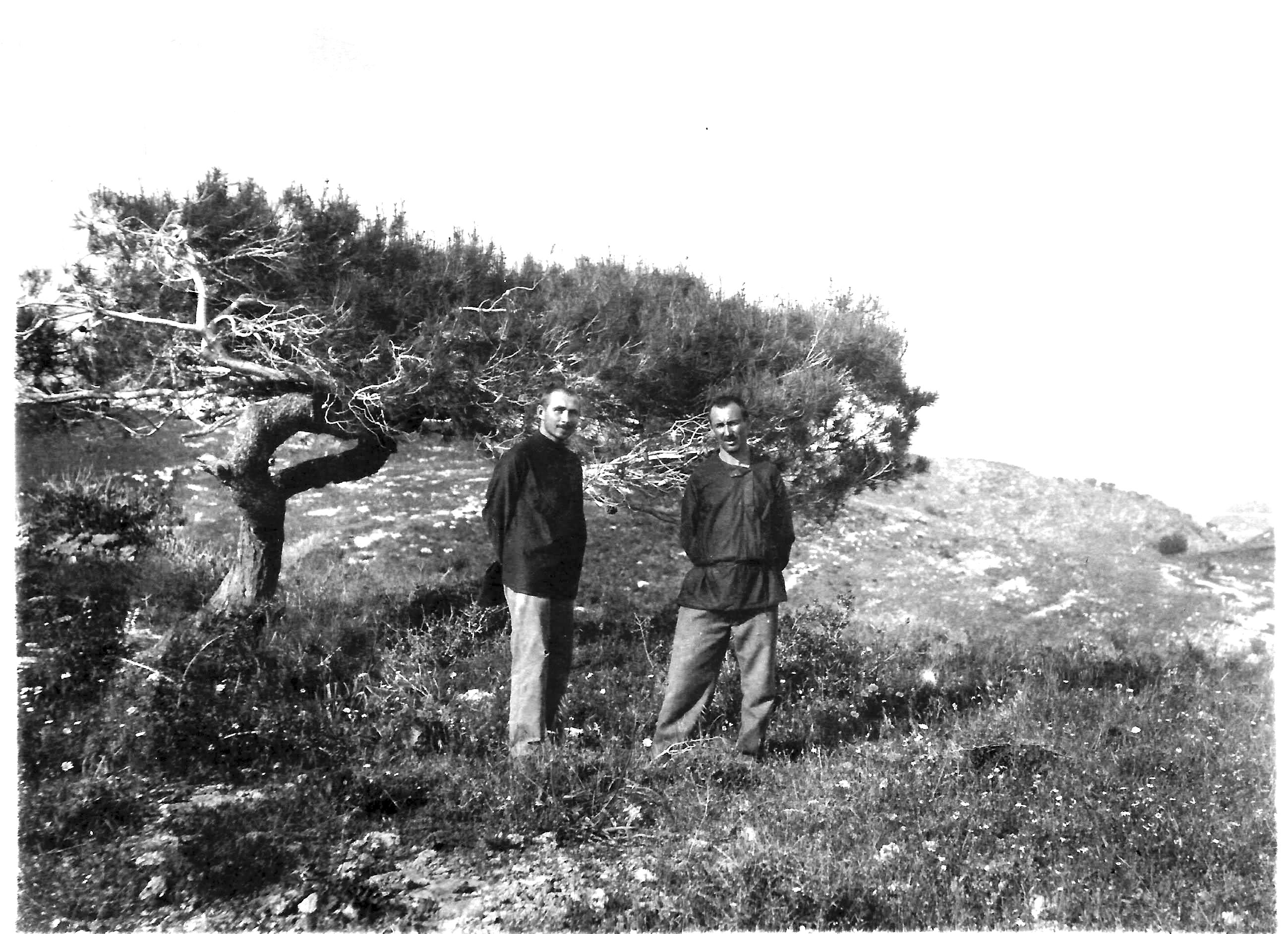 אלכסנדר איג וחברו הטוב, אליעזר פקטורי